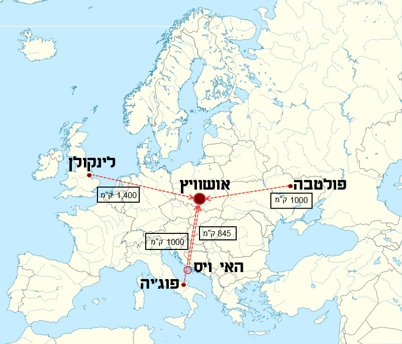 הפצצת אושוויץ עם חיצים